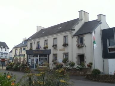 La mairie de la ville.